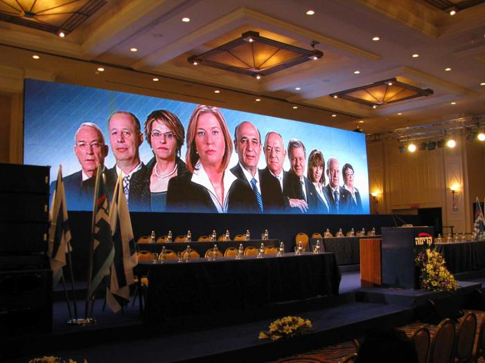 ערב בחירות 2009, מטה קדימה